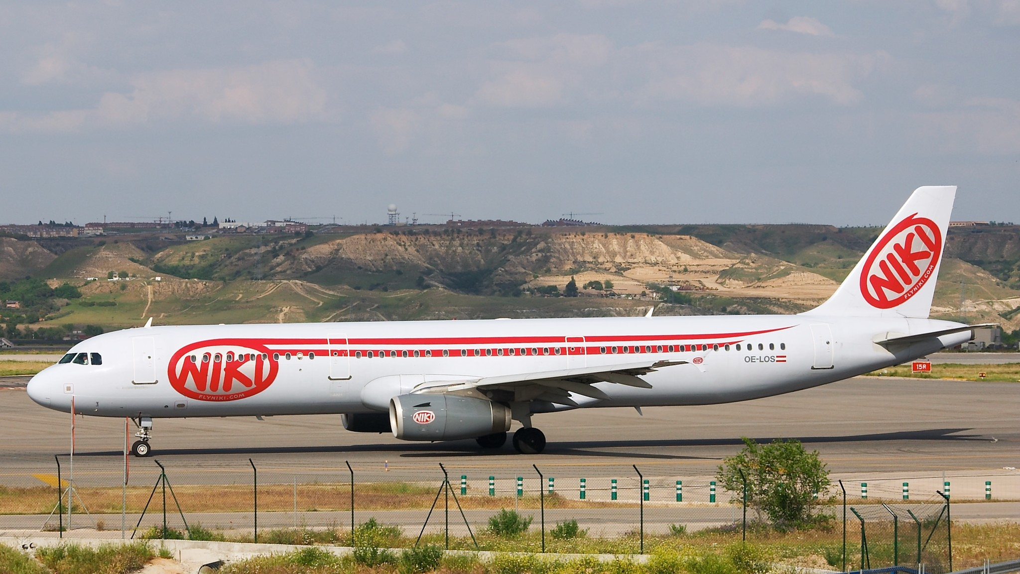 Airbus A321-231 rodando en el aeropuerto de Madrid Barajas.